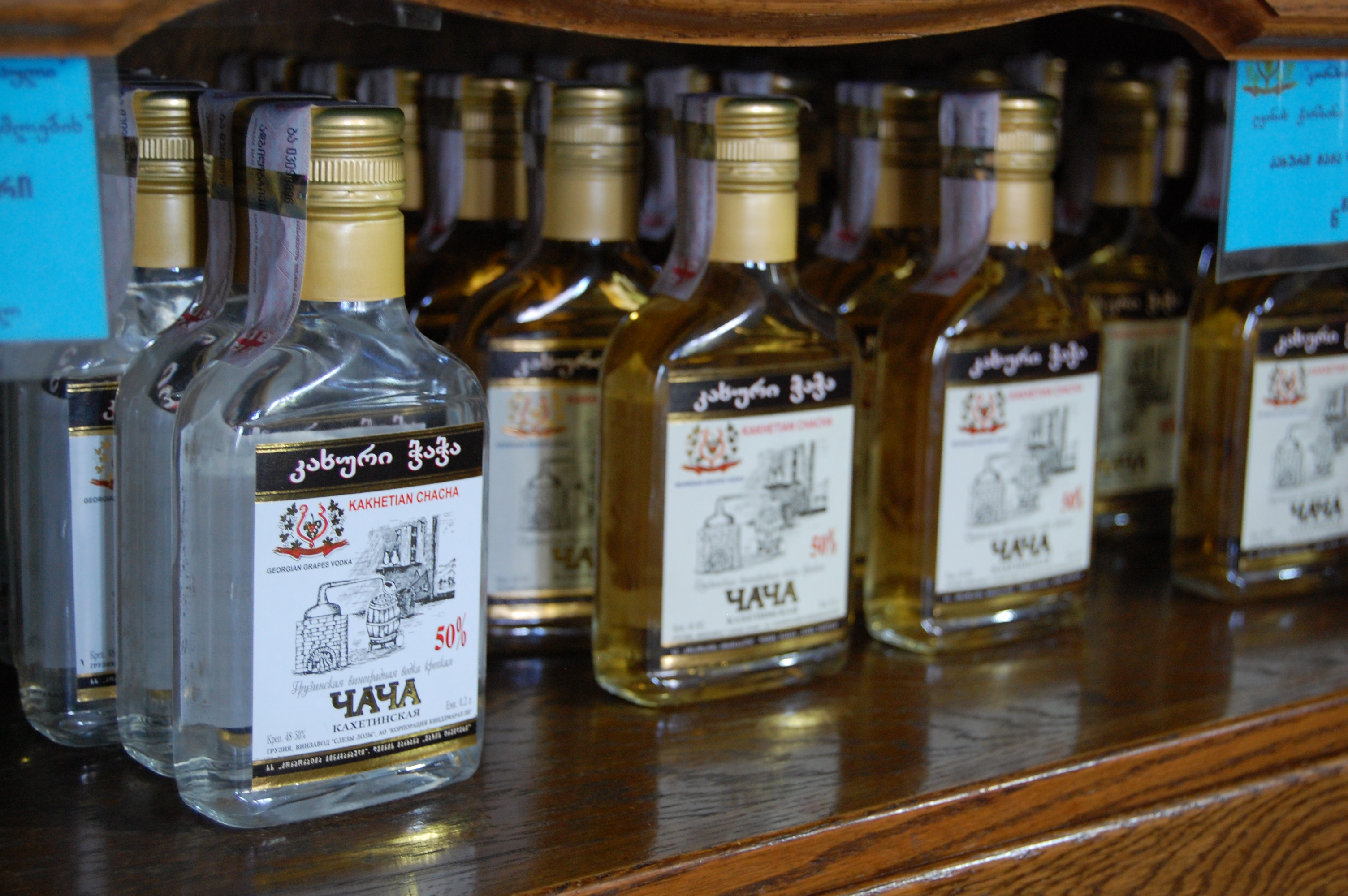 Kindzmarauli Corp. Georgia - Sakartvelo